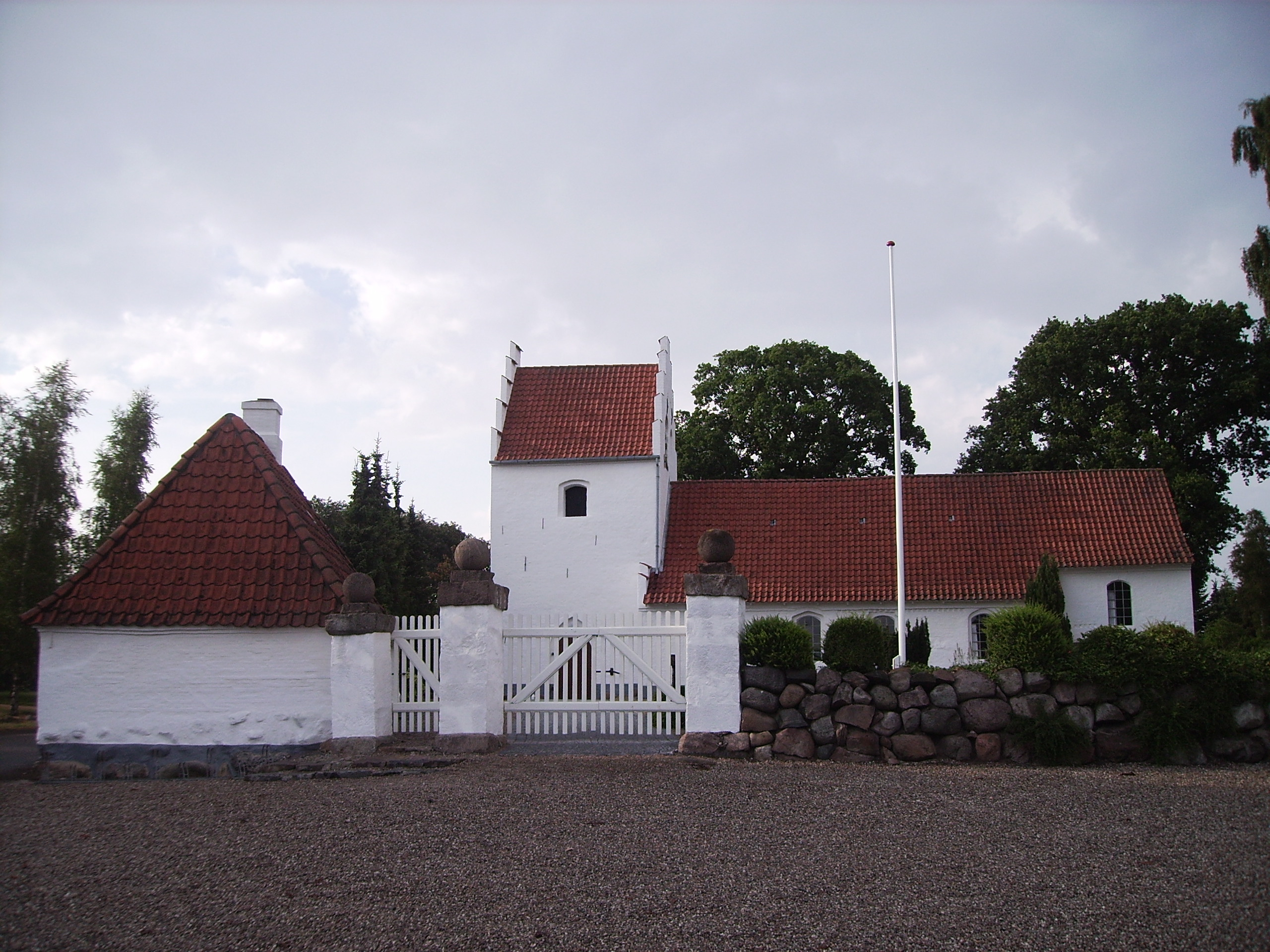 Seden Kirke, Seden Sogn, Åsum Herred, Odense Amt, Denmark (Danish Church) - Seden Kirke fra syd